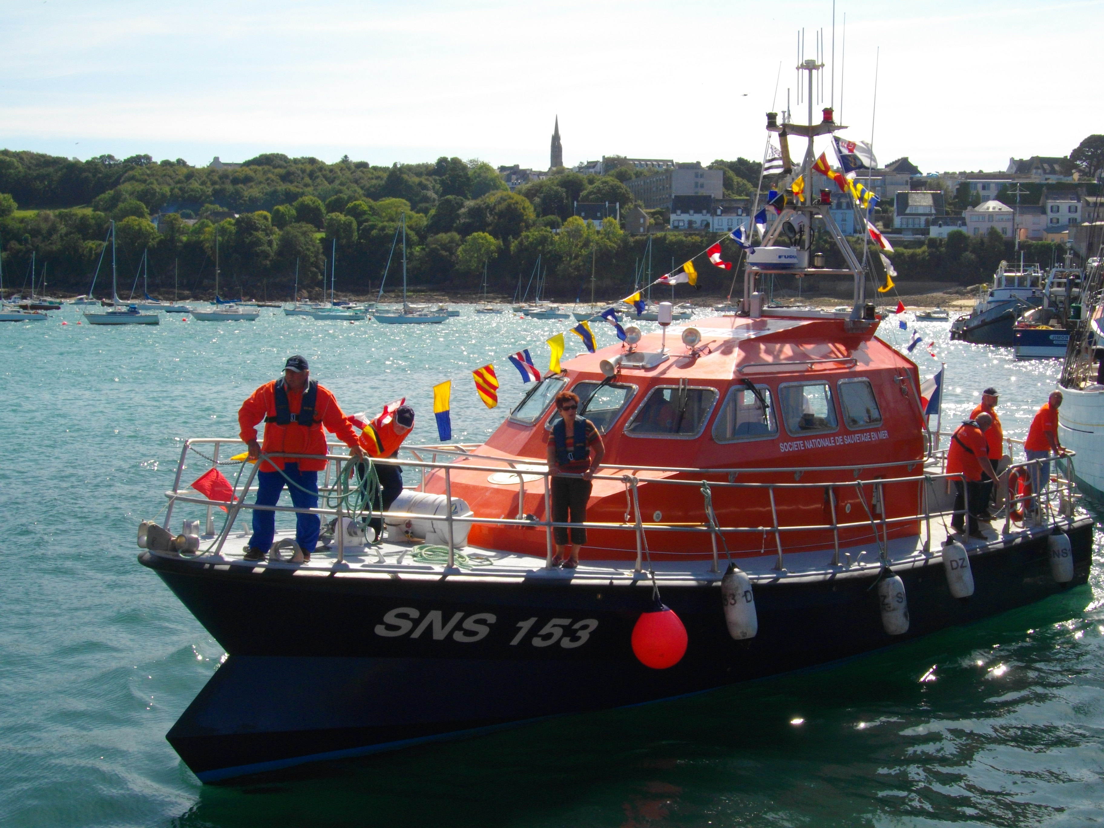 La vedette SNSM de 1° classe Penn Sardin SNS 153 (Douarnenez)